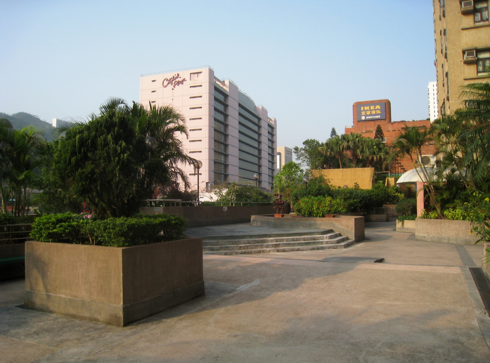 HK Wai Wah Centre Garden 偉華中心